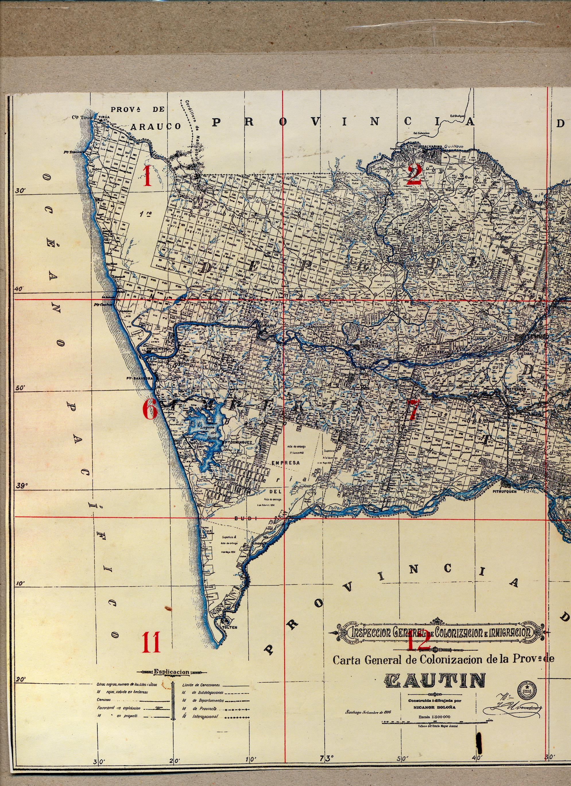 Matas propiedad de la Tierra